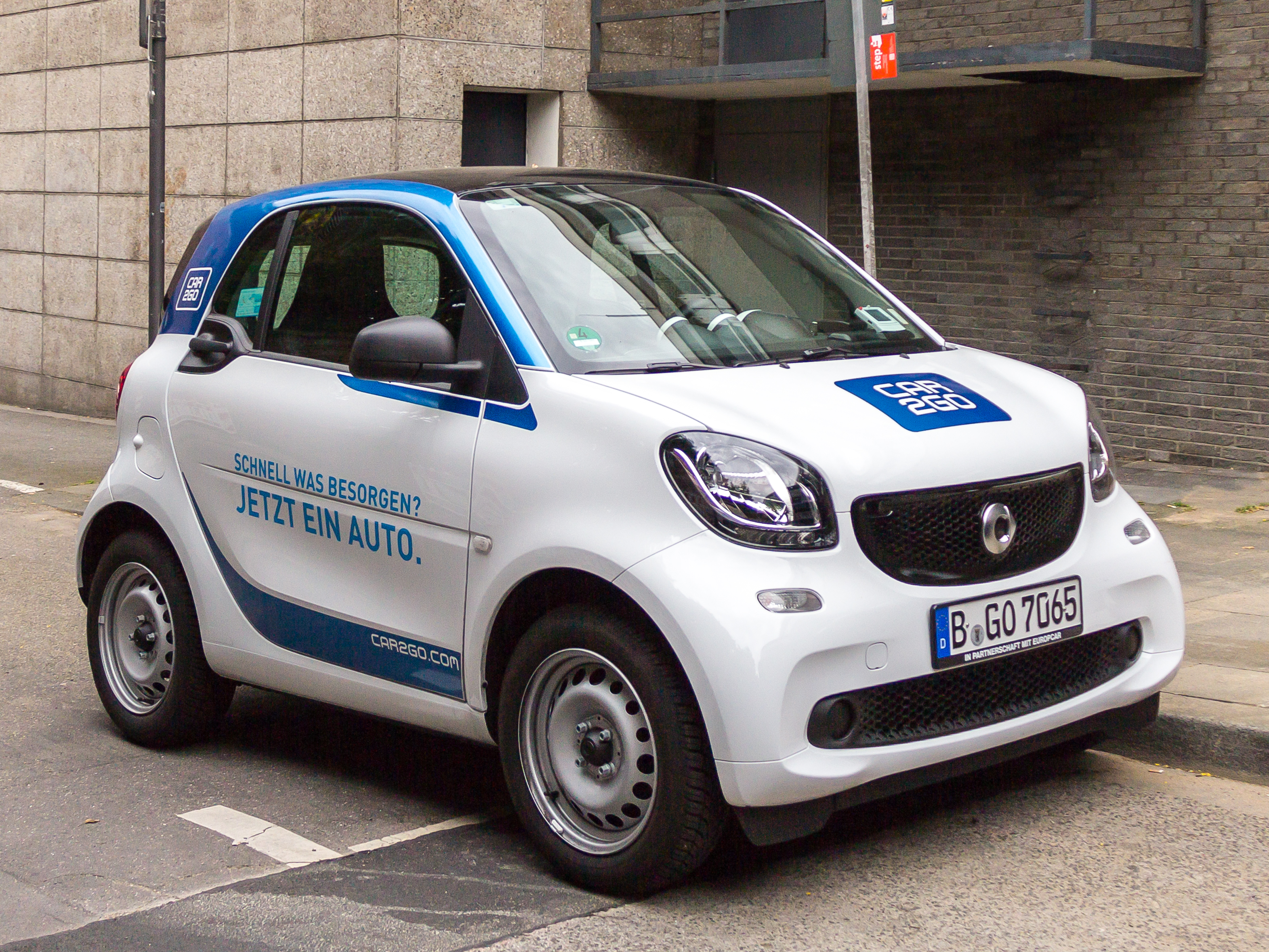 Car2Go Köln - Schnell was besorgen? Jetzt ein Auto